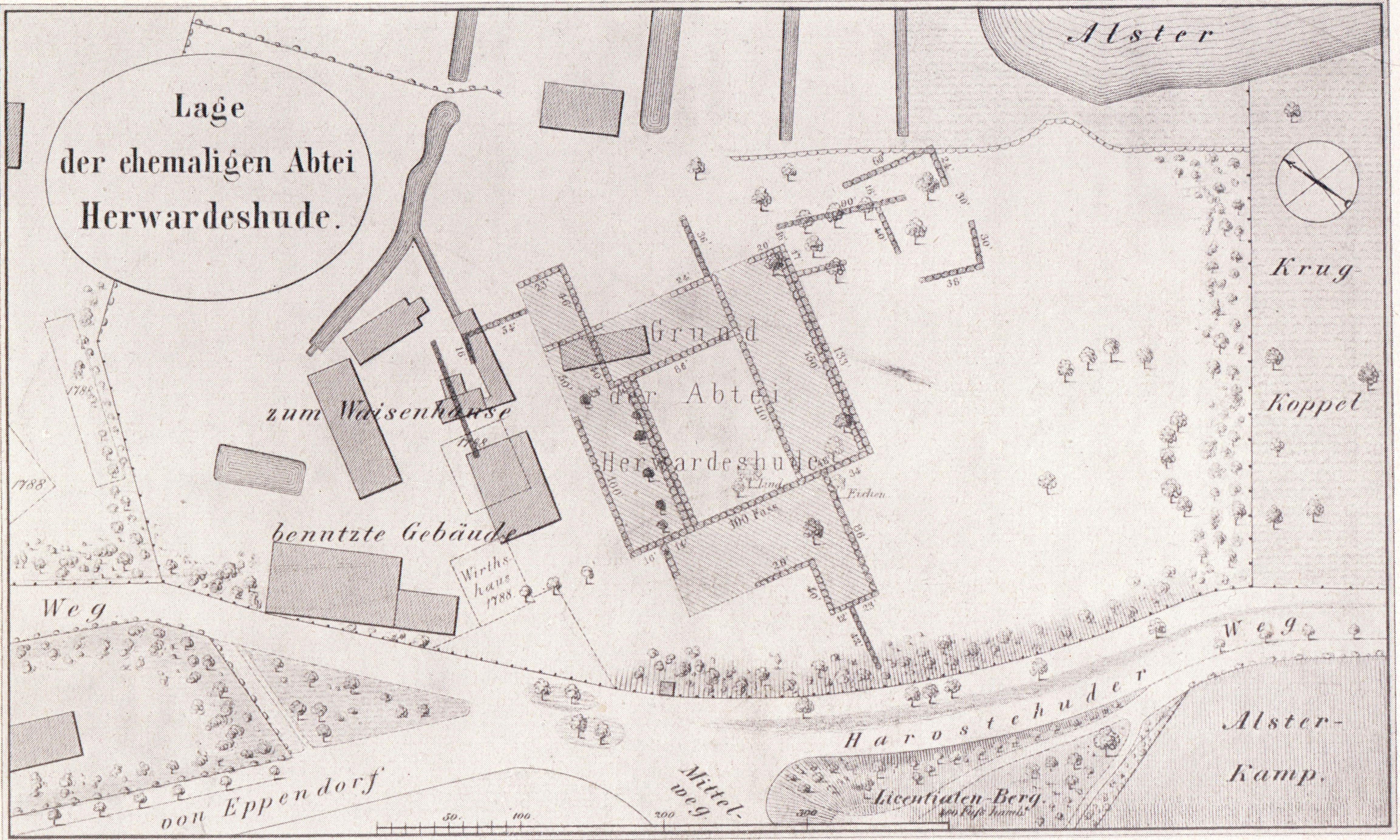 Zeichnung über die Lage des Klosers Herwardeshude in Hamburg Harvestehude, von C.F. Gaedechens, entstanden um 1890; die Karte zeigt sowohl die Gebäude von 1788 (Wirtshaus), von 1842 (Waisenhaus im ehemaligen Pachthaus) wie die Klosteranlagen vor 1530